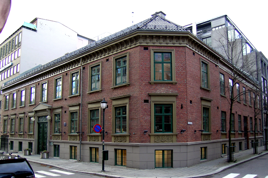 Dronningens gate 3, Oslo. Built 1836-1840. Litauens ambassade har lokaler i gården.